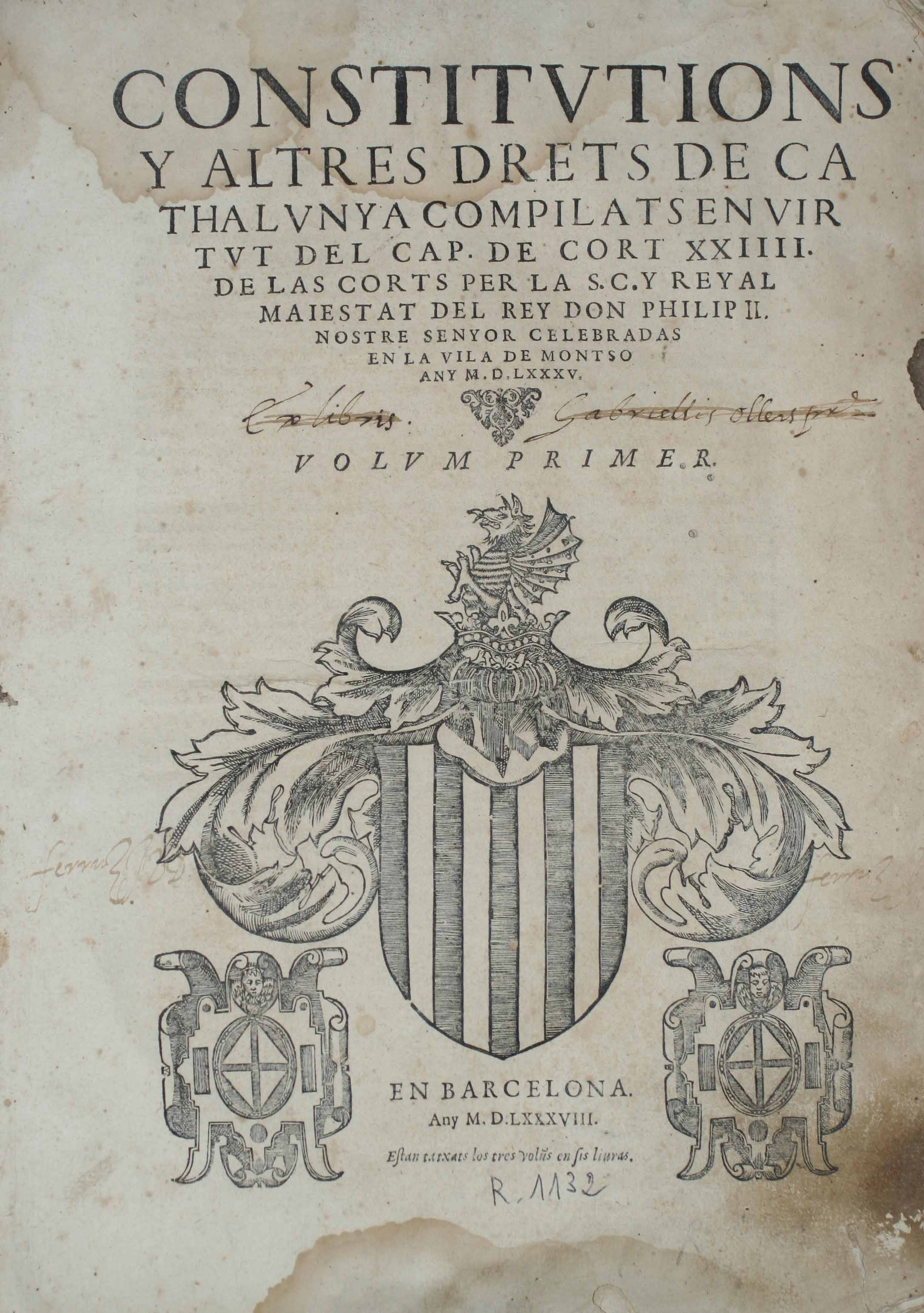 Llibre de les Constitucions de Catalunya compilat desprès de la Cort de Felip II a la vila de Montsó de 1585. En aquest llibre s'actualitzen les Constitucions, eliminant les parts derogades i afegint-hi les que s'han aprovat en el transcurs d'aquesta Cort. Dades tècniques Títol: Constitutions y altres drets de Cathalunya compilats en virtut del Capítol de Cort XXIIII de las Corts per la S.C. y Reyal Maiestat del Rey Don Philip II, nostre senyor, celebradas en la vila de Montsó. Any MDLXXXV Data: 1588 Suport material: Paper Mides: 350 x 450 cm